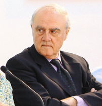 Agustín Squella, Chilean lawyer.